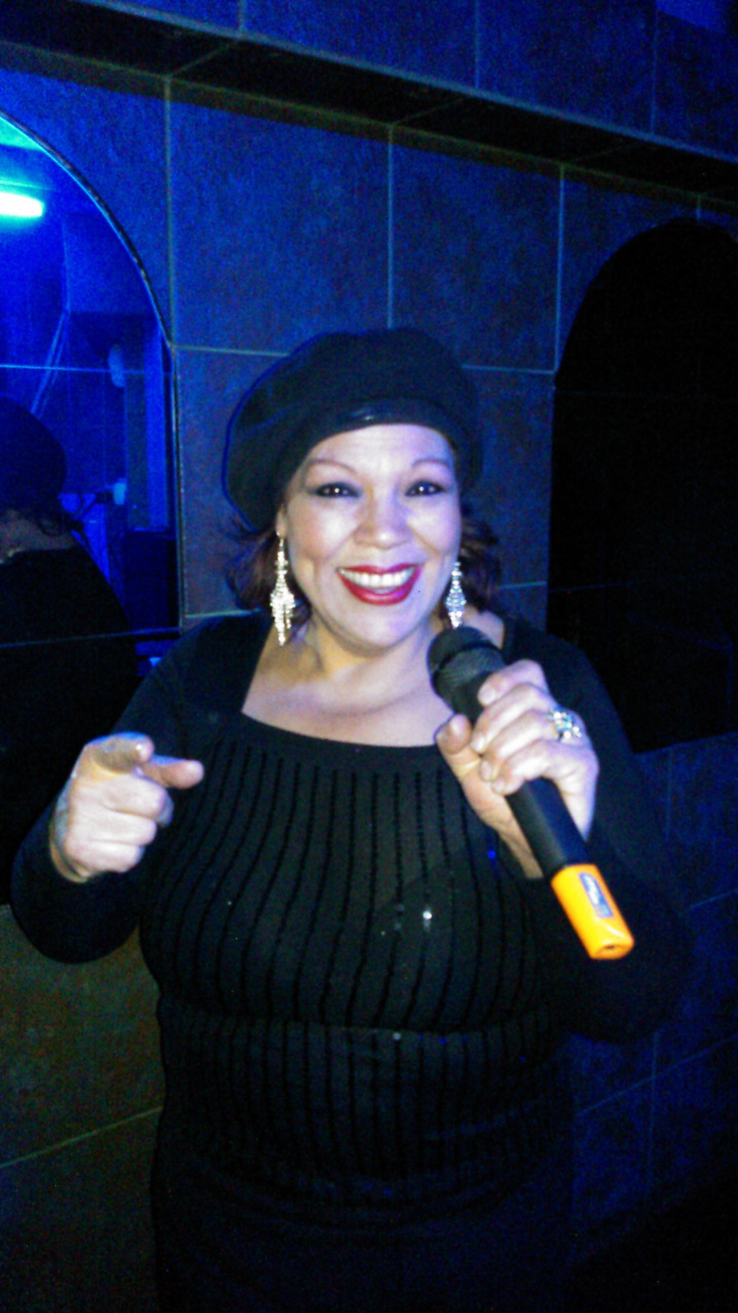 animando martes miércoles y jueves en Príncipe Discotheque